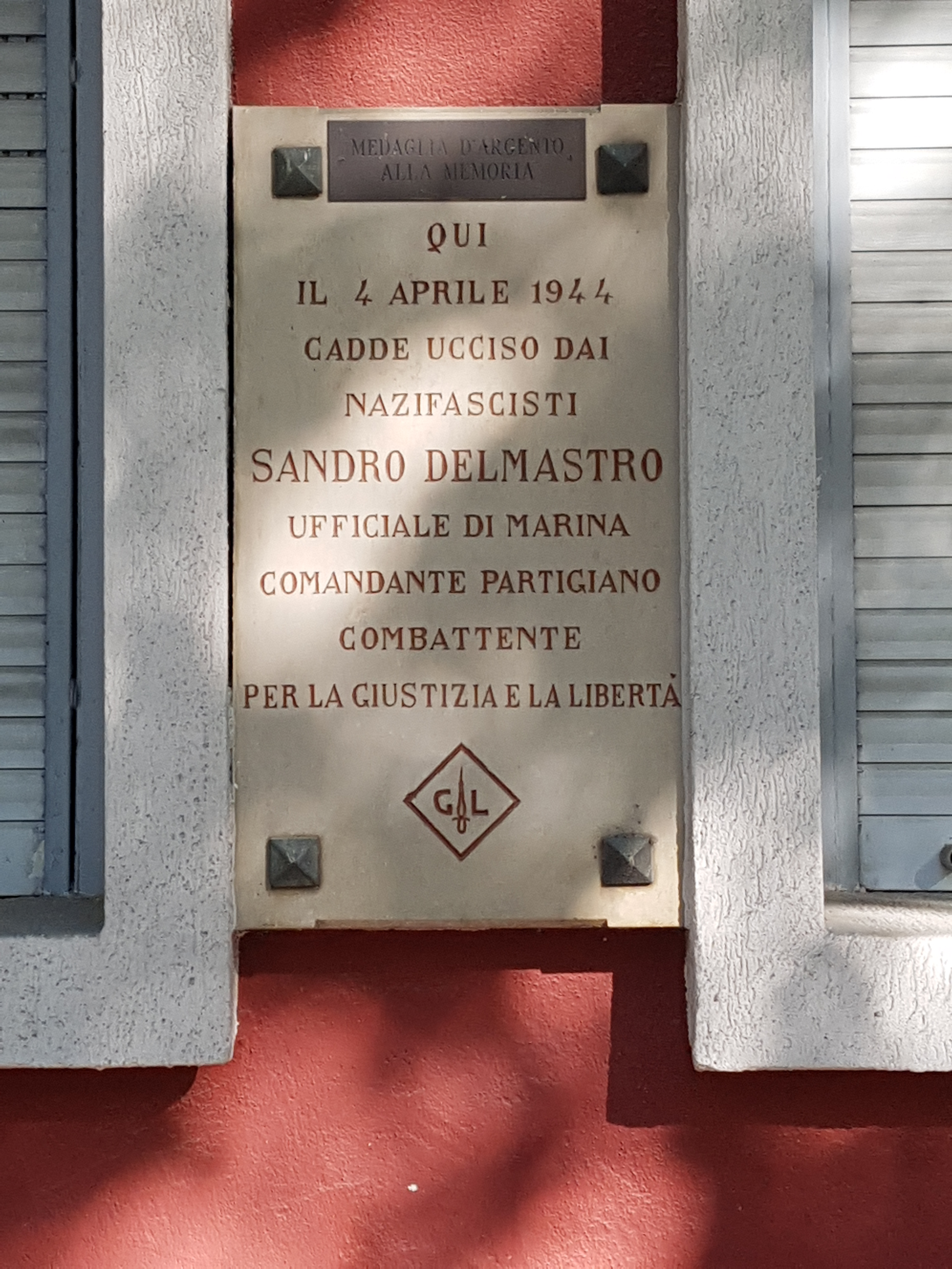 Lapide commemorativa di Sandro Delmastro, capo partigiano appartenente alle Brigate “Giustizia e Libertà”, ucciso il 4 aprile 1944 da un quindicenne della banda “Ettore Muti” durante un tentativo di fuga dalla polizia fascista che lo aveva catturato e lo stava conducendo alla vicina Casa della Gioventù italiana del Littorio di Cuneo per sottoporlo a un interrogatorio.